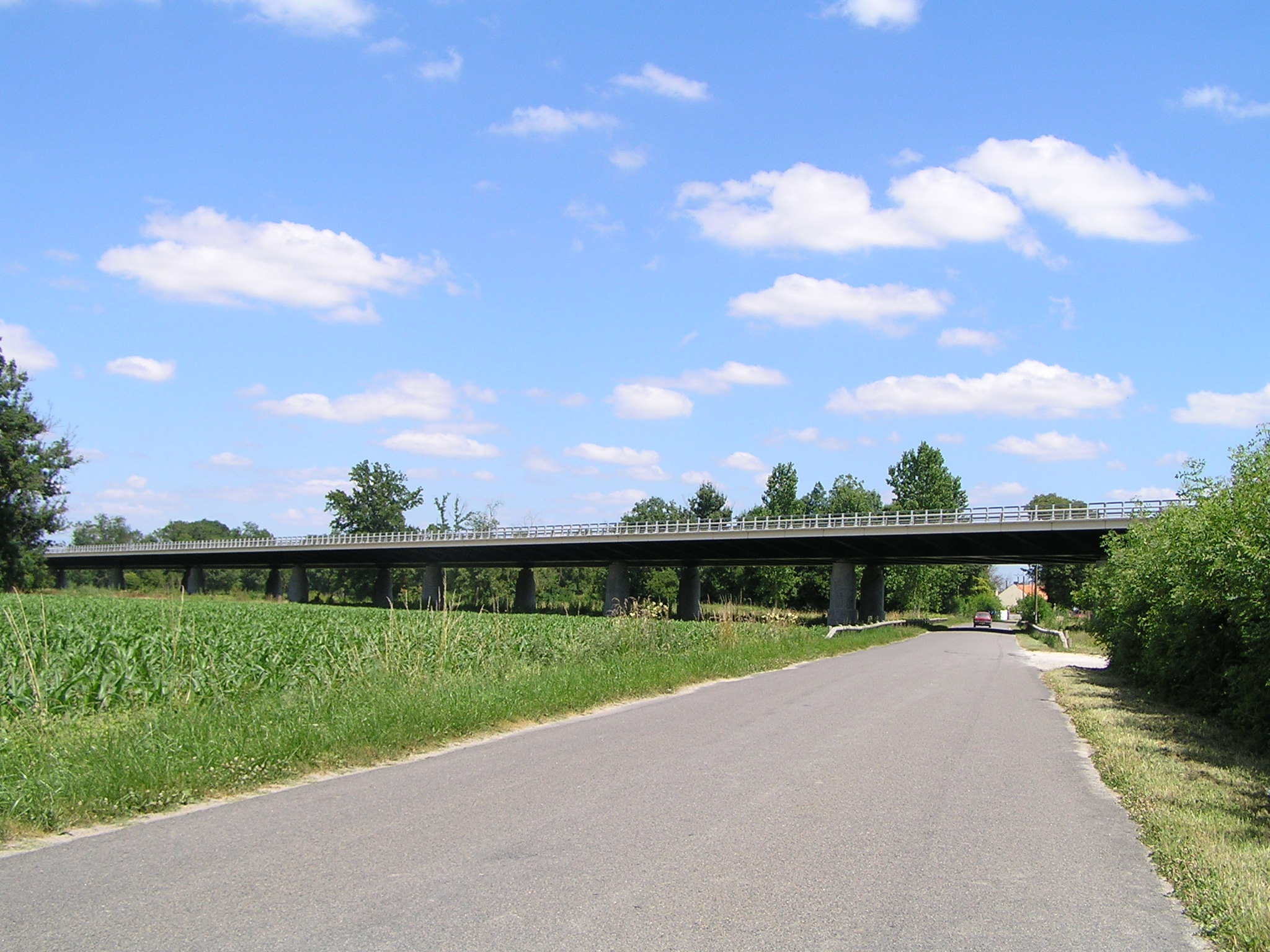 déviation de Jarnac au-dessus de Gondeville